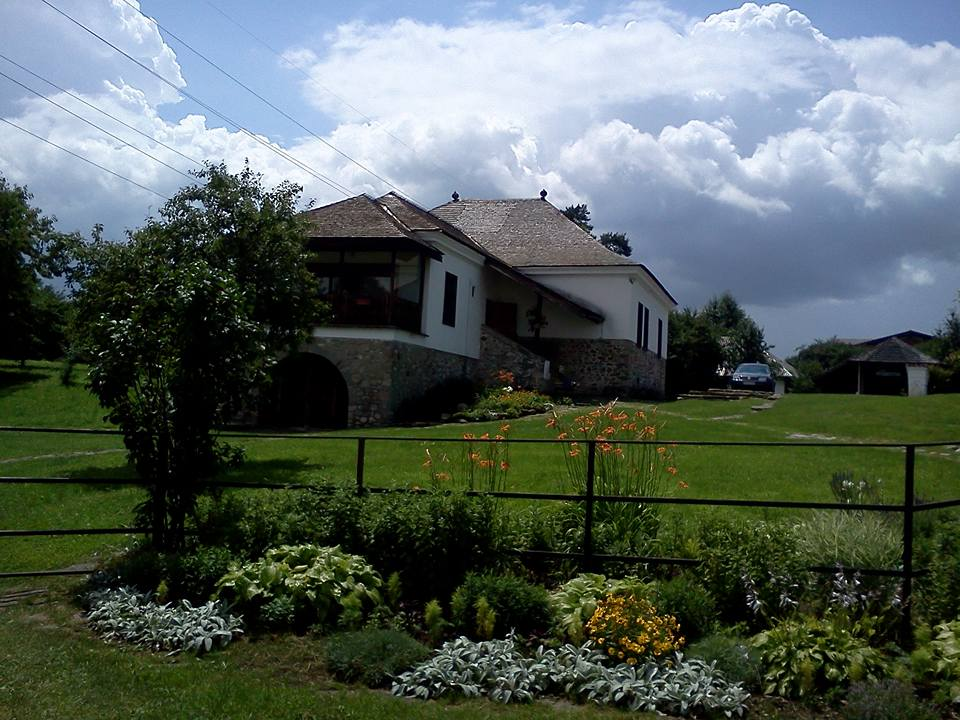 Stăreția schitului „Slobozia”, azi casa parohială a bis. „Sf. Nicolae”